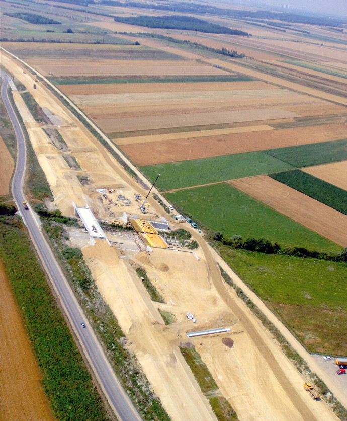 Site Prellenkirchen, excavationarea